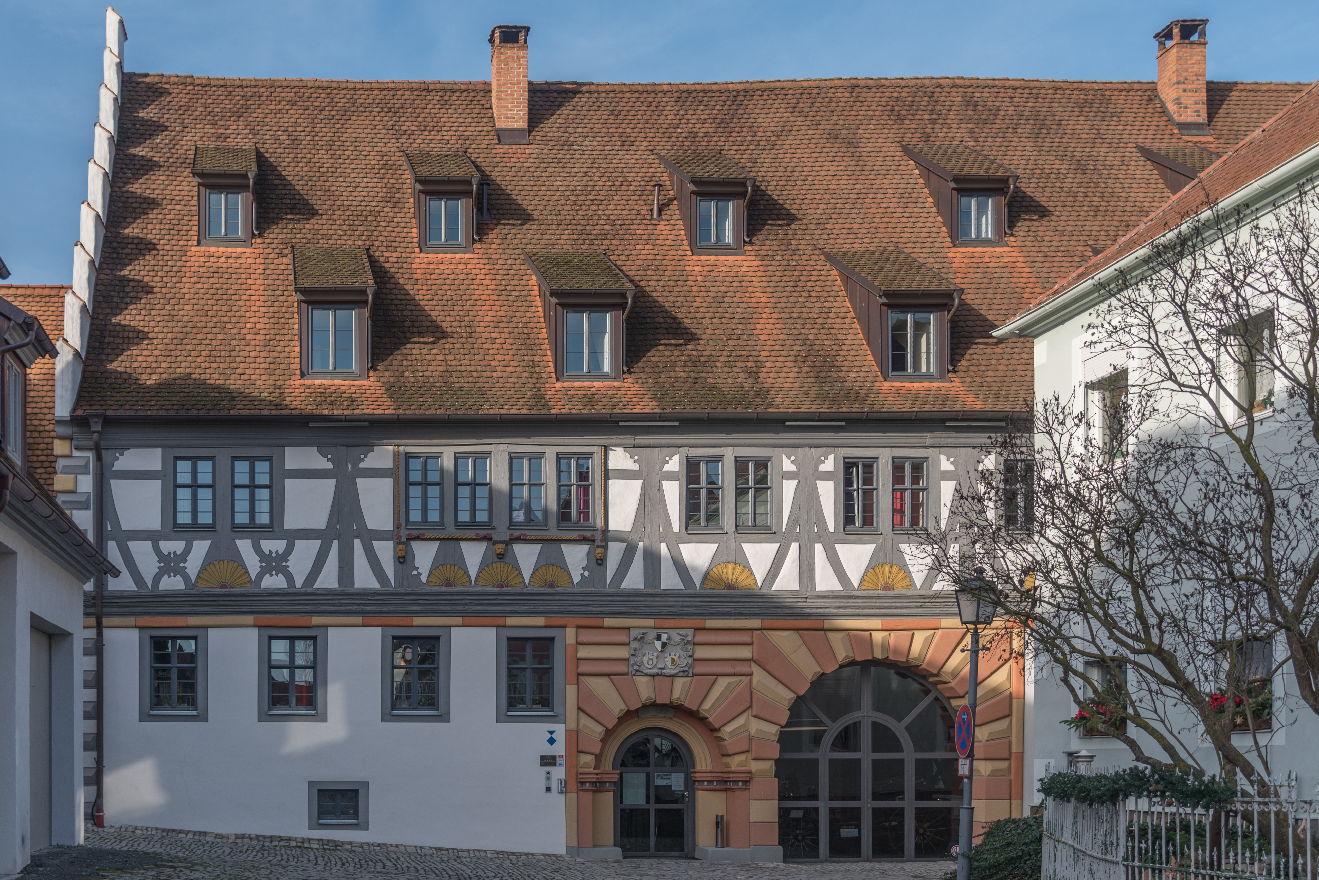 Prichsenstadt, Freihofgasse 3